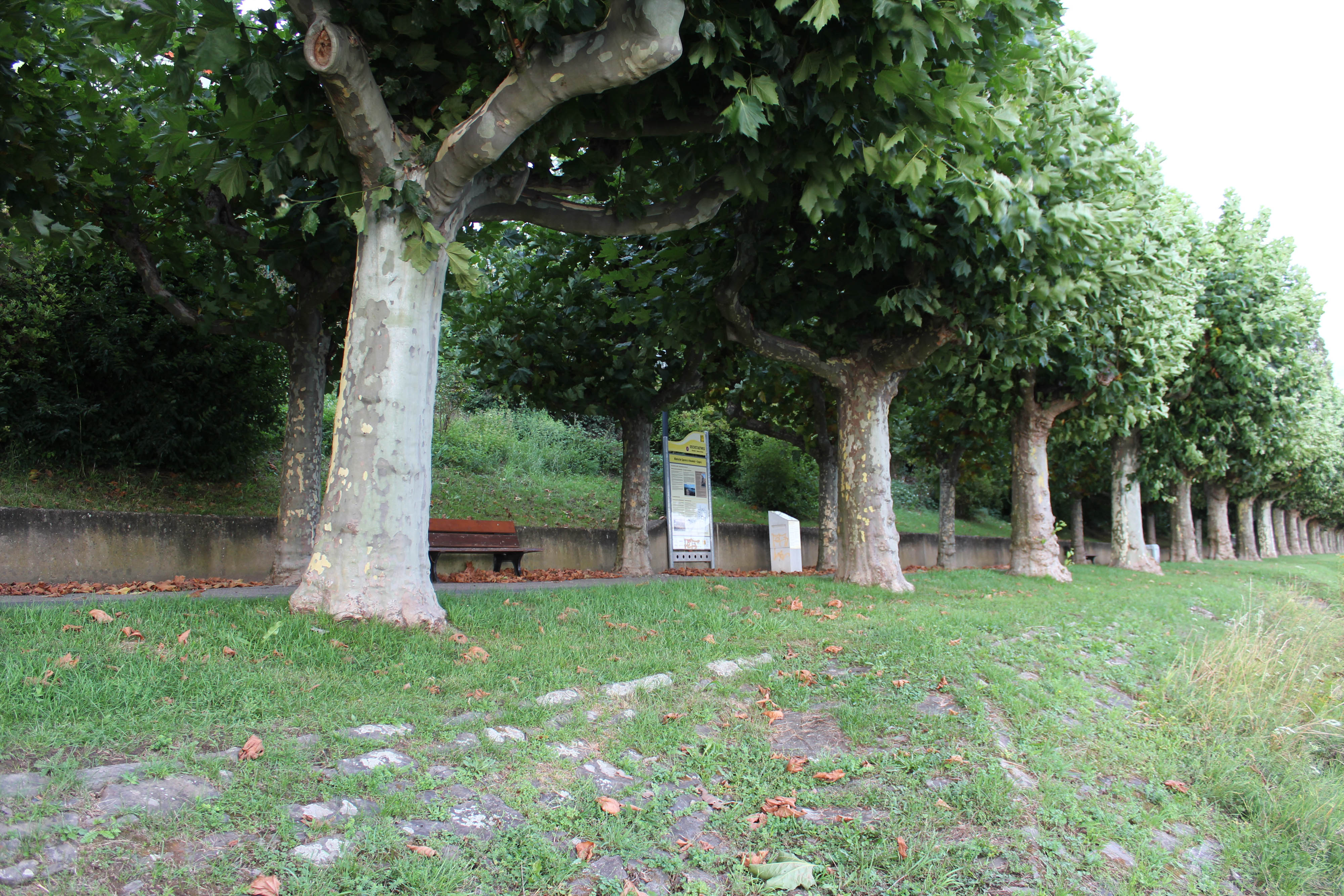 Die Informationstafel steht an der Stelle des römischen Burgus von Neuwied-Engers.